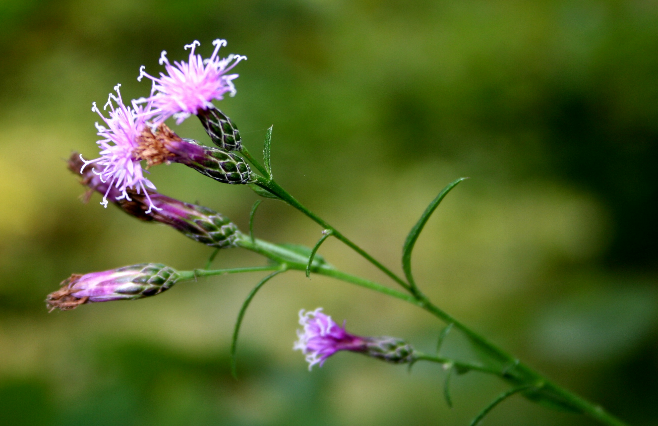 Serratula_tinctoria subsp monticola (Cerretta comune)